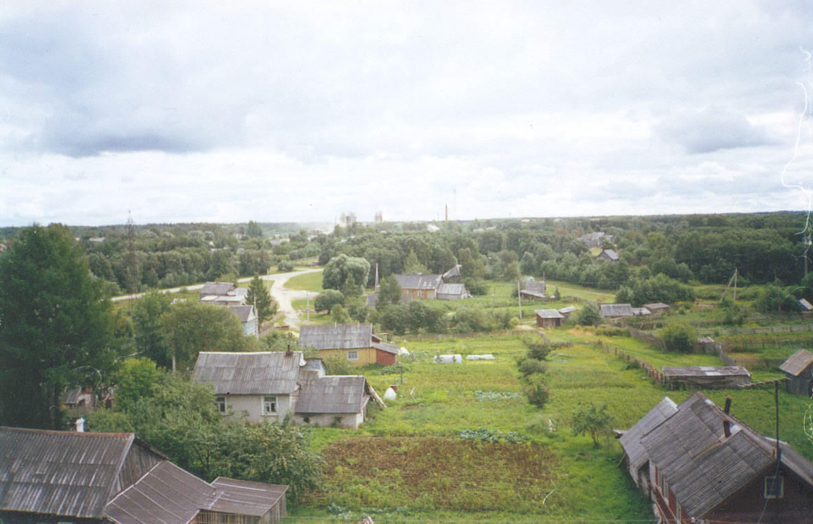 Угловка